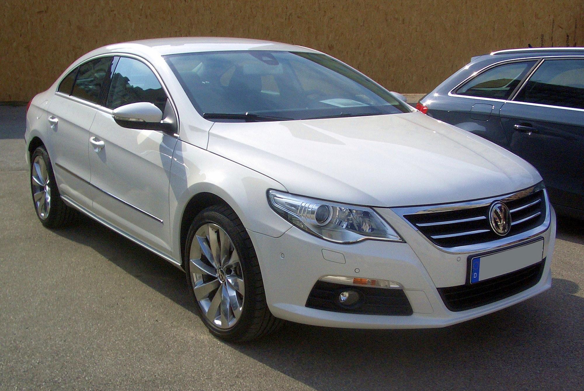 VW Passat CC